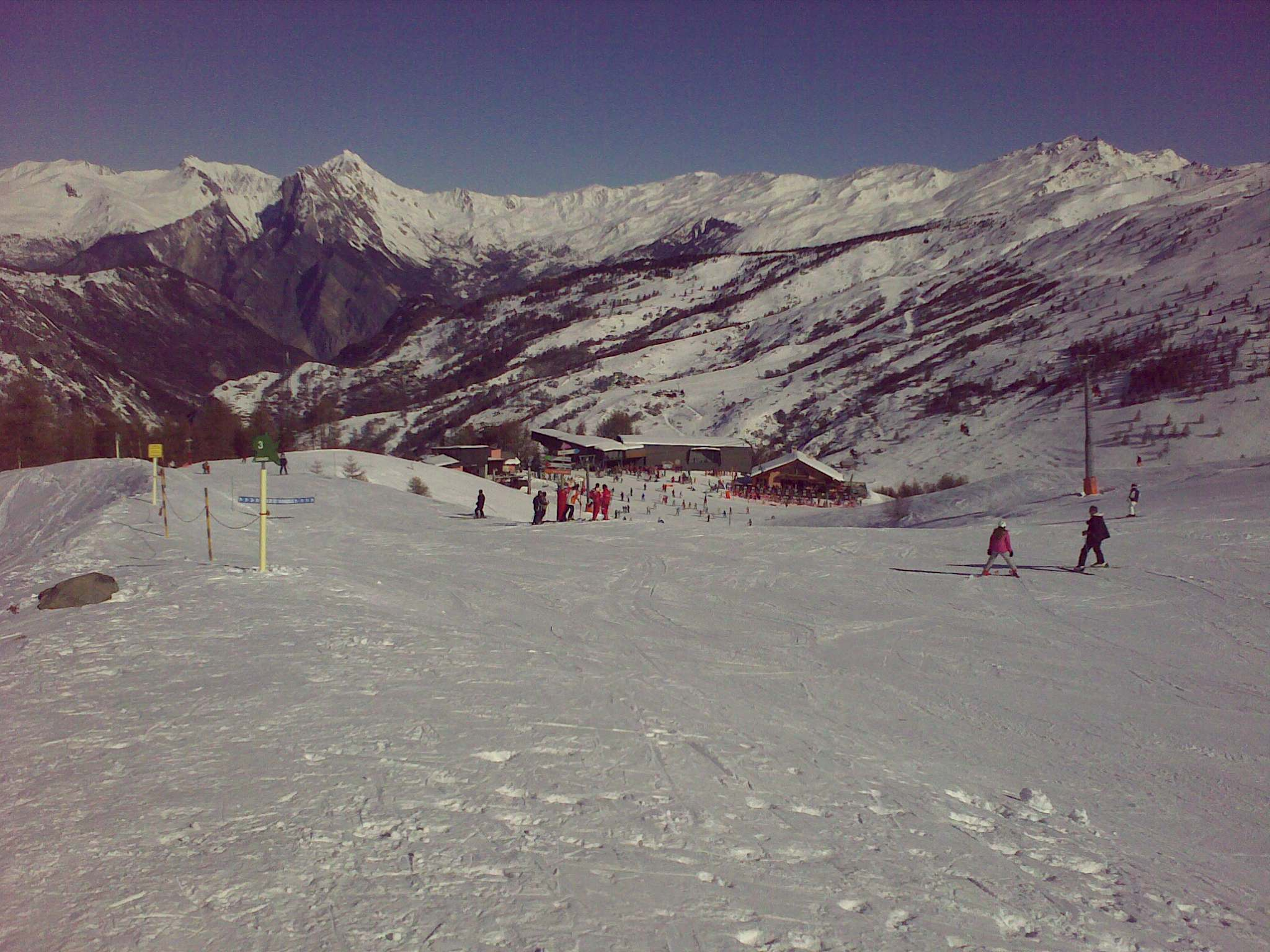 L'ancien télésiège de Sétaz 2 et l'arrivée de la télécabine de la Sétaz.